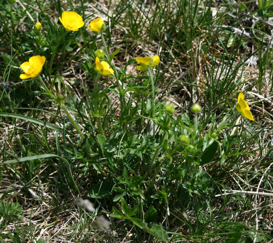 Ranunculus carinthiacus, Hahnenfußgewächse (Ranunculaceae) - Slowenien/Slovenija/Slovenia: Trnovski gozd, Kucelj